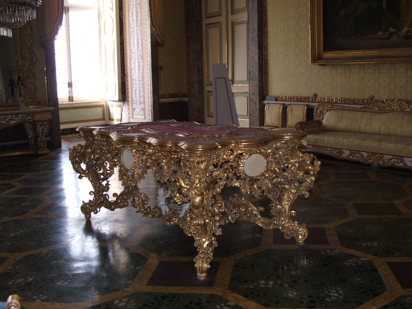 Caserta, immagini dalla Reggia di Caserta Tavolino